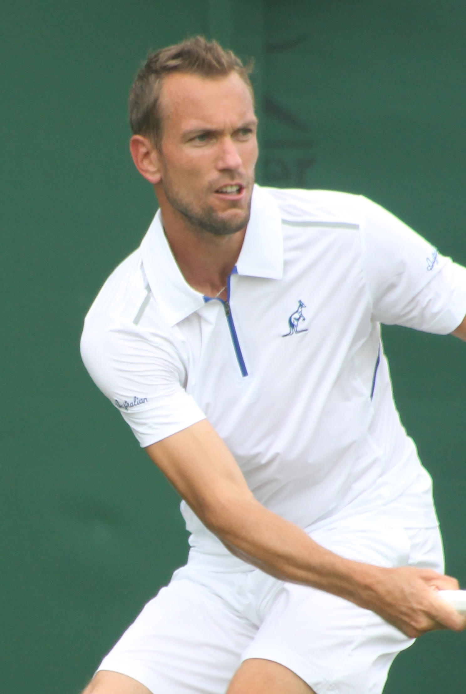 Mertl WMQ14 (5)